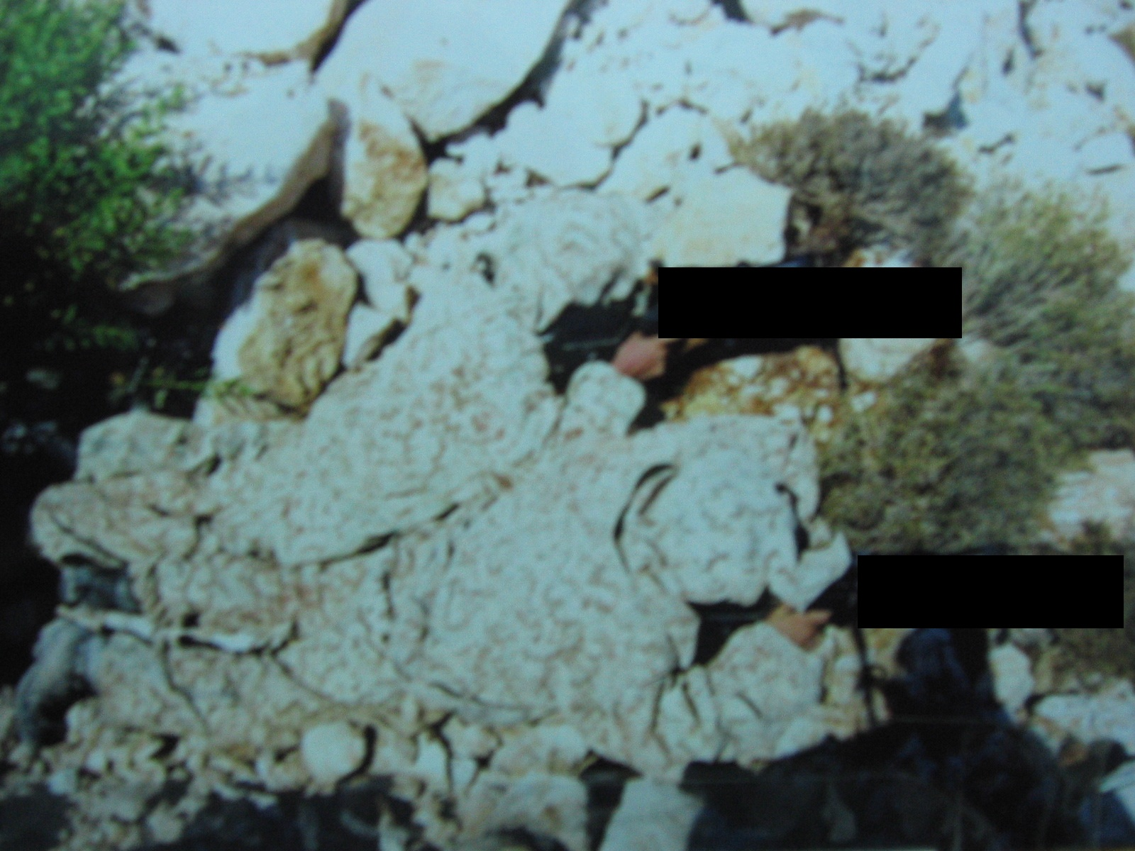 צלפים במהלך המבצע